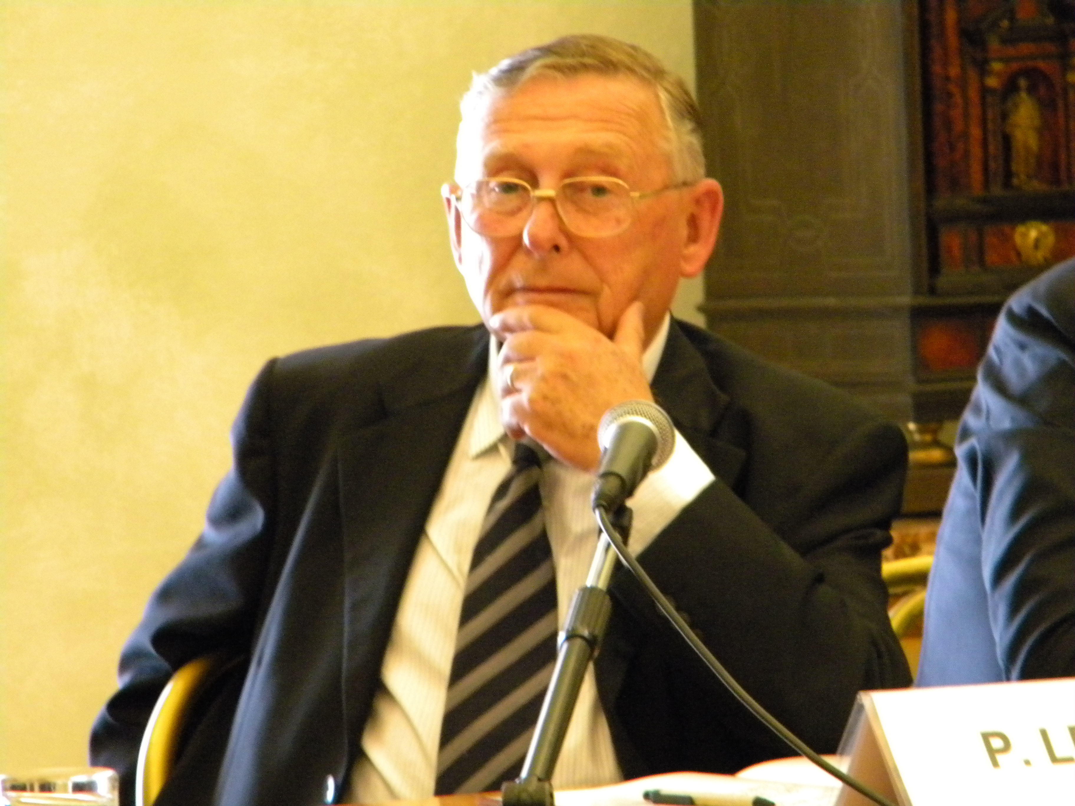 Paolo Leon